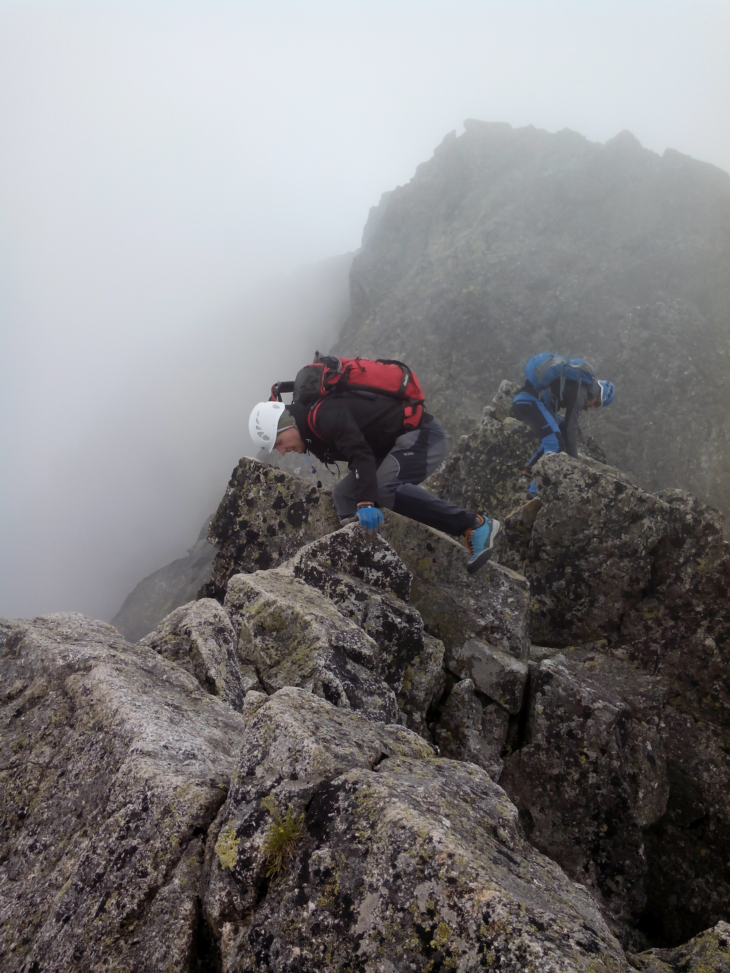 Lodowy koń